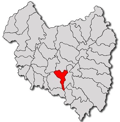 Categorie:Hărţi ale judeţului Covasna